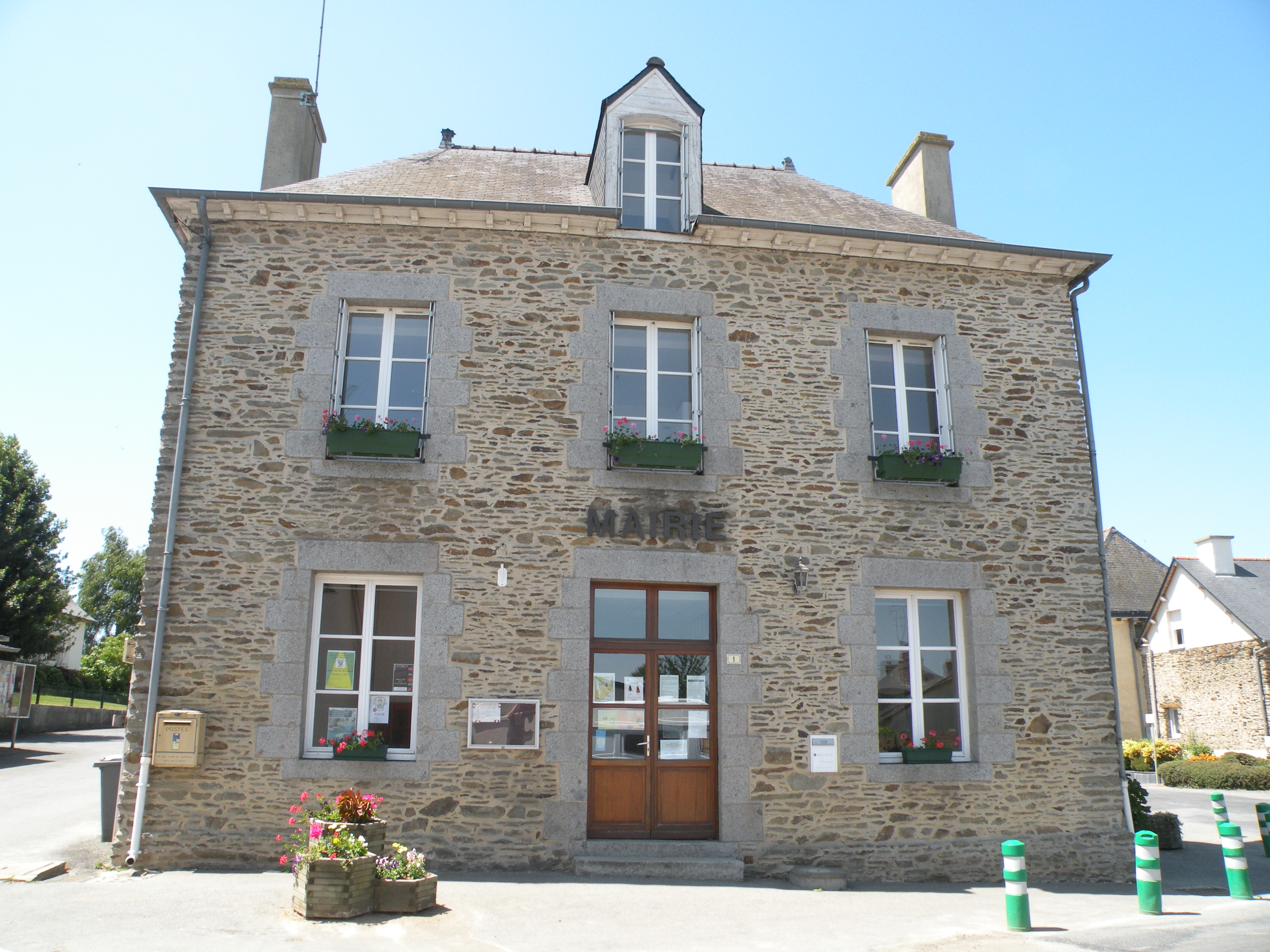 Mairie de Cornillé vue de face (Ille-et-Vilaine).